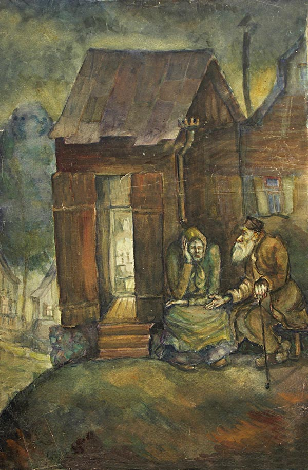 картина "Городок" художника В.А.Сулимо-Самойло